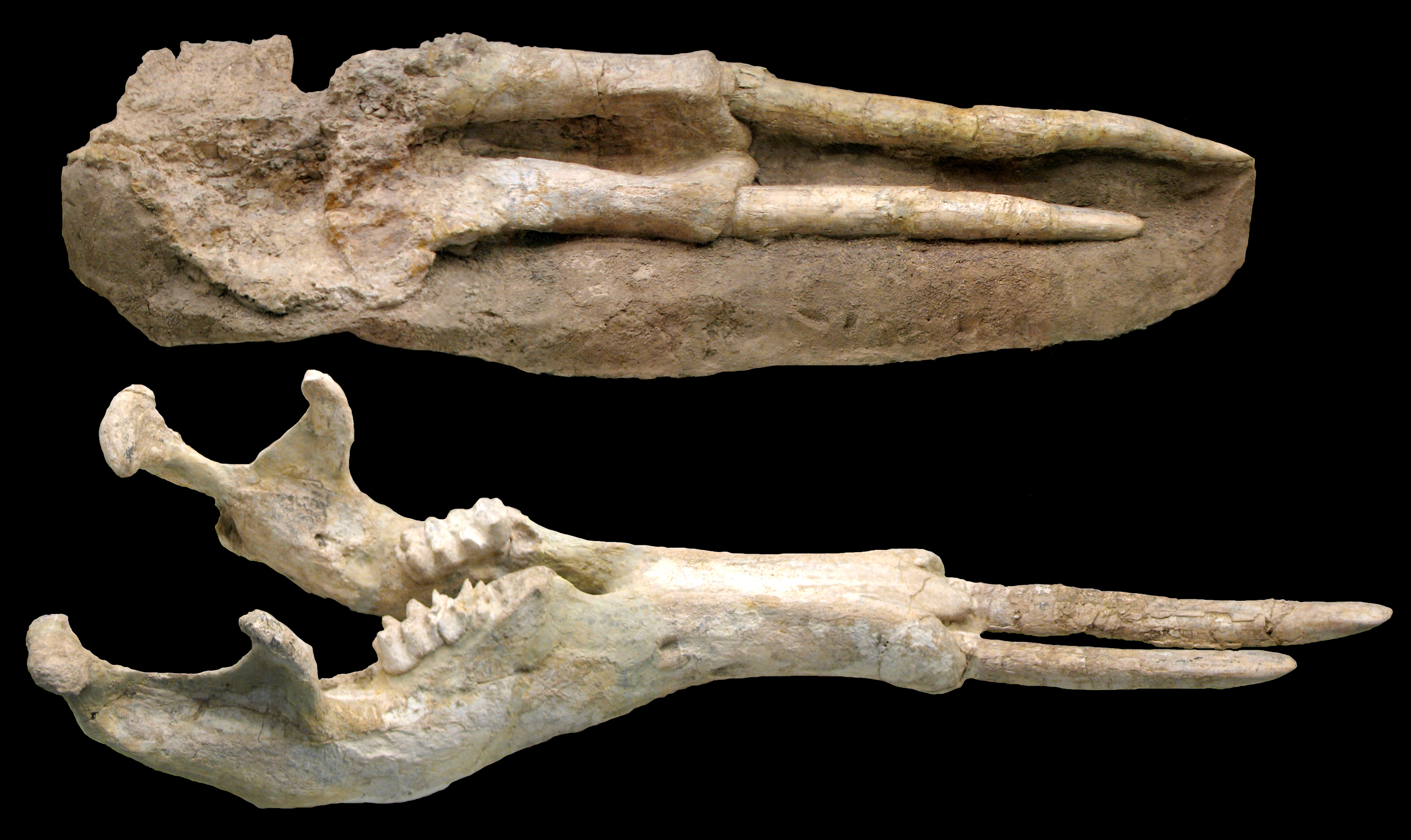 Cráneo de Tetralophodon longirostris. Yacimiento Batallones 2, Torrejón de Velasco, Madrid, España. Exposición temporal "La colina de los tigres dientes de sable. Los yacimientos miocenos del cerro de los Batallones (Torrejón de Velasco, Comunidad de Madrid)" en el Museo Arqueológico Regional (MAR), Alcalá de Henares (Madrid)